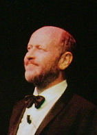 Marcos Mundstock